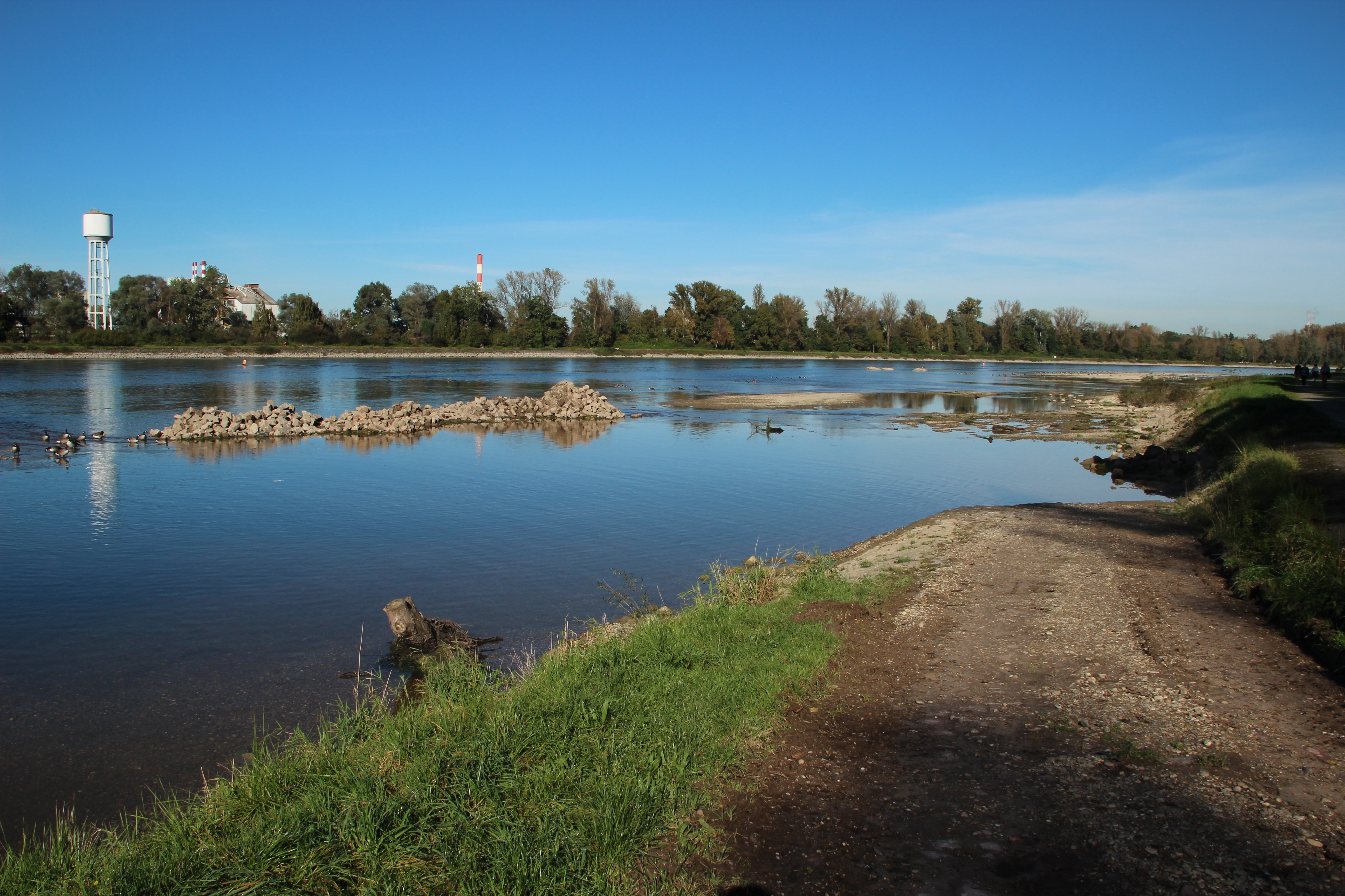 Bildinhalt: Der Rhein um die Tomateninseln, flussabwärts der Einmündung des Illinger Altrheins Aufnahmeort: Au am Rhein, Deutschland